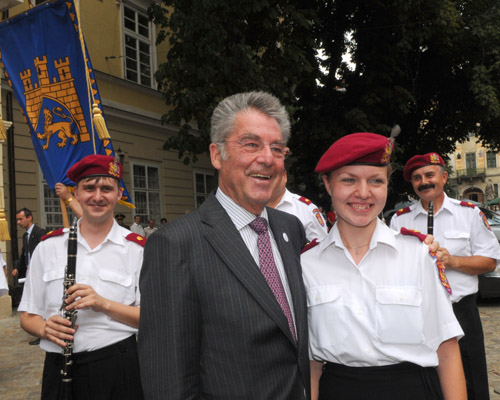 Зустріч Президента Австрійського парламенту